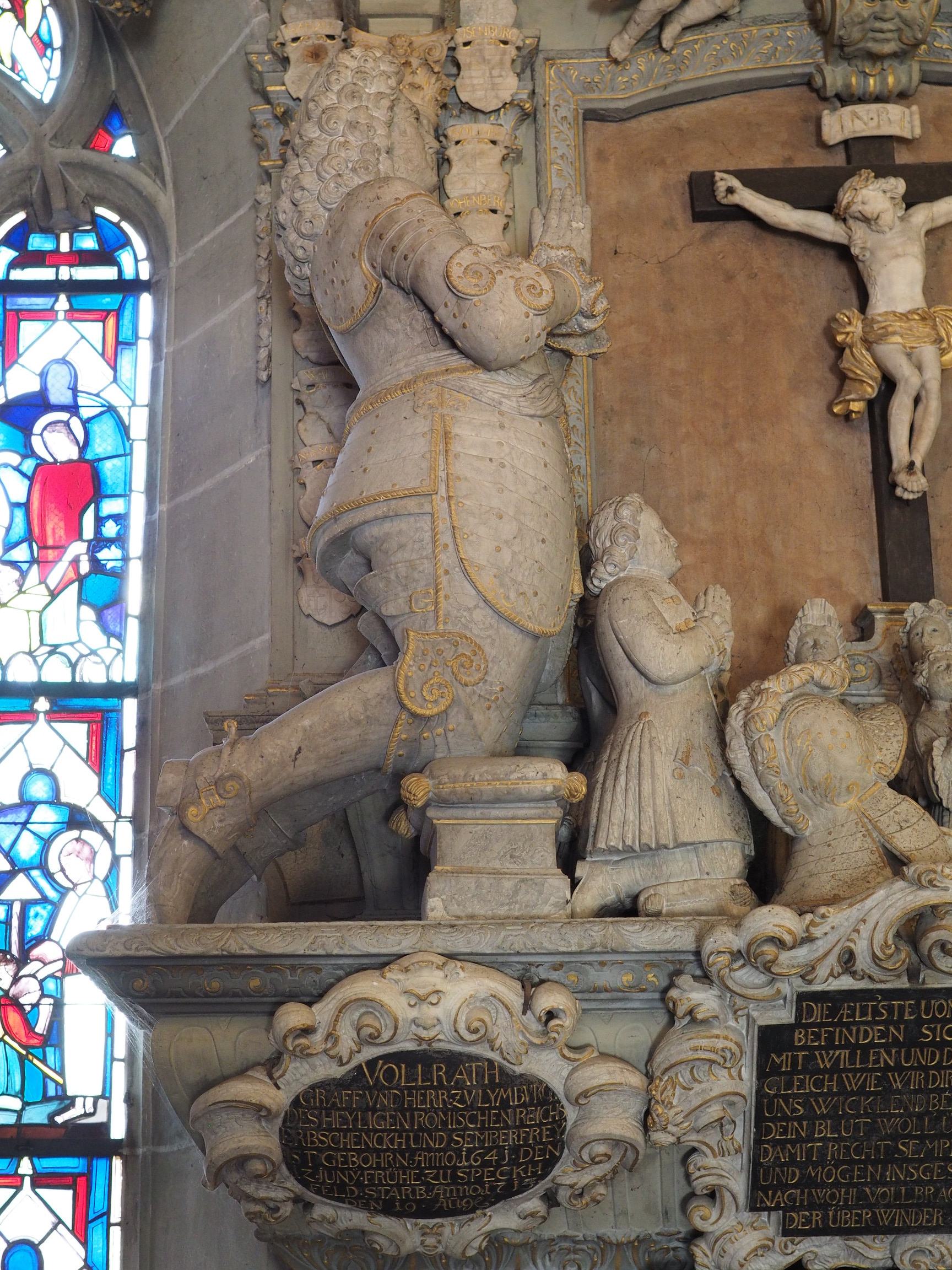 Epitaph Vollrath Schenk zu Limpurg in der Evangelischen Pfarrkirche in Obersontheim